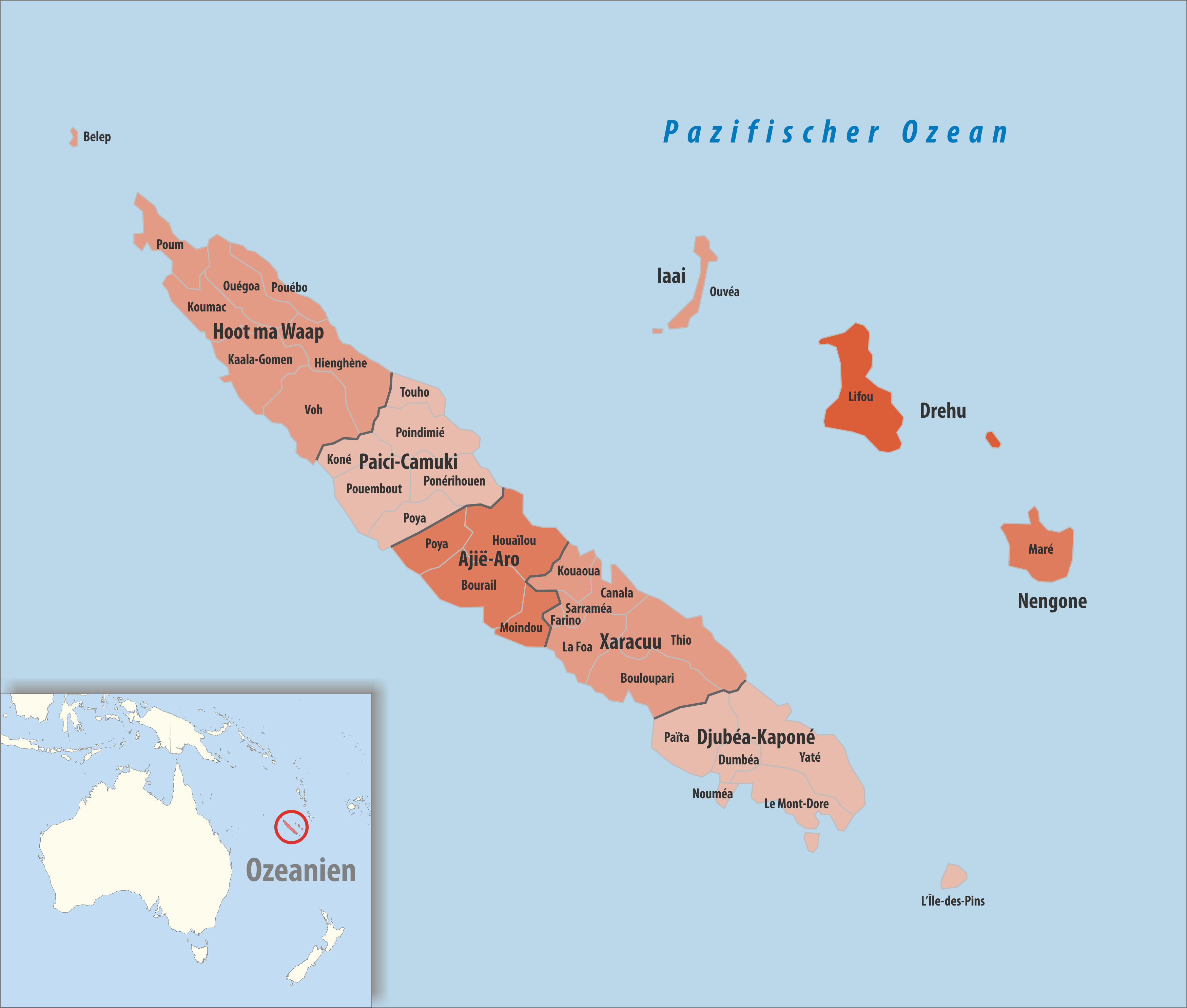 Gemeindeverbände in Neukaledonien